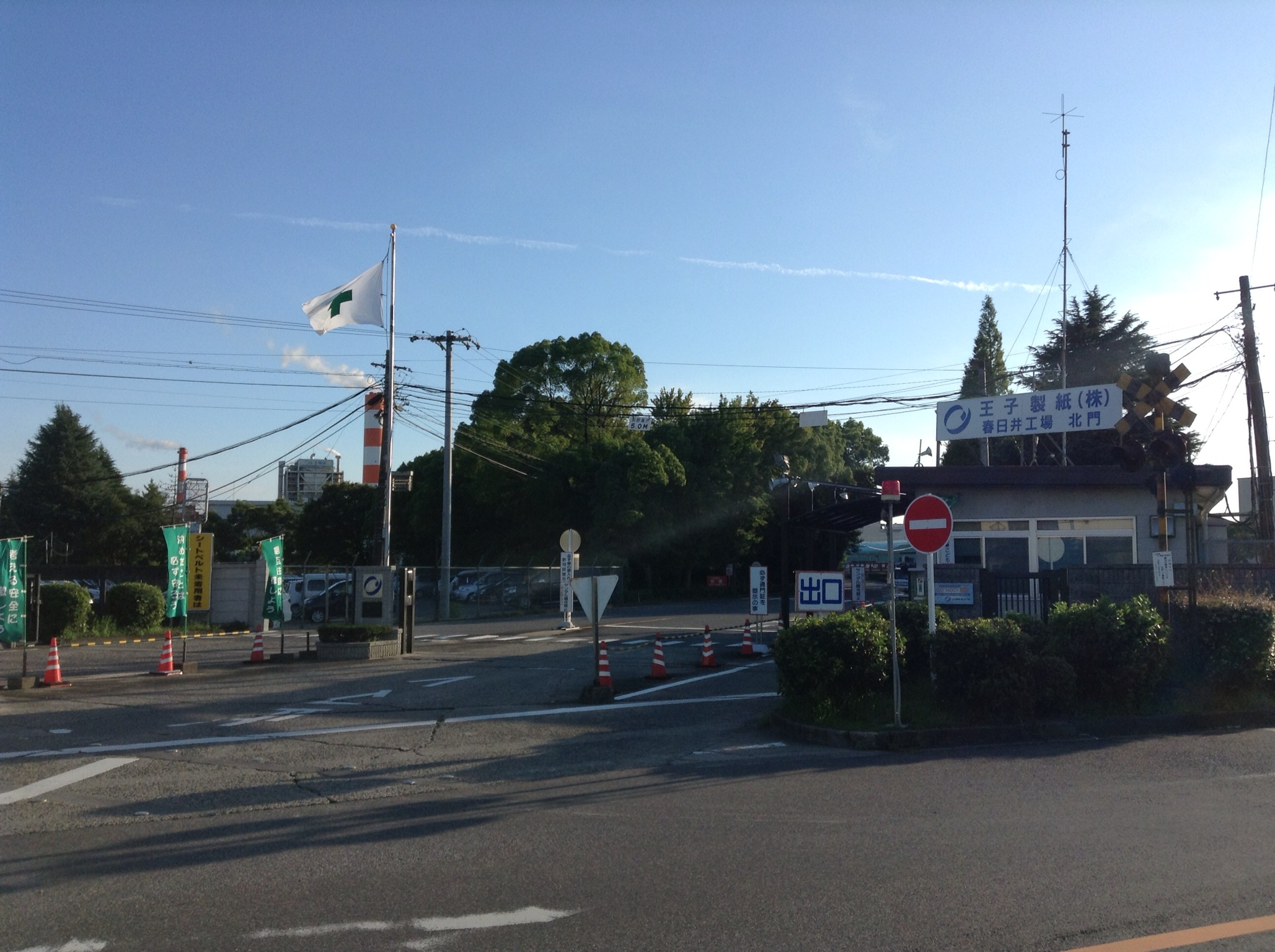 王子製紙春日井工場北口